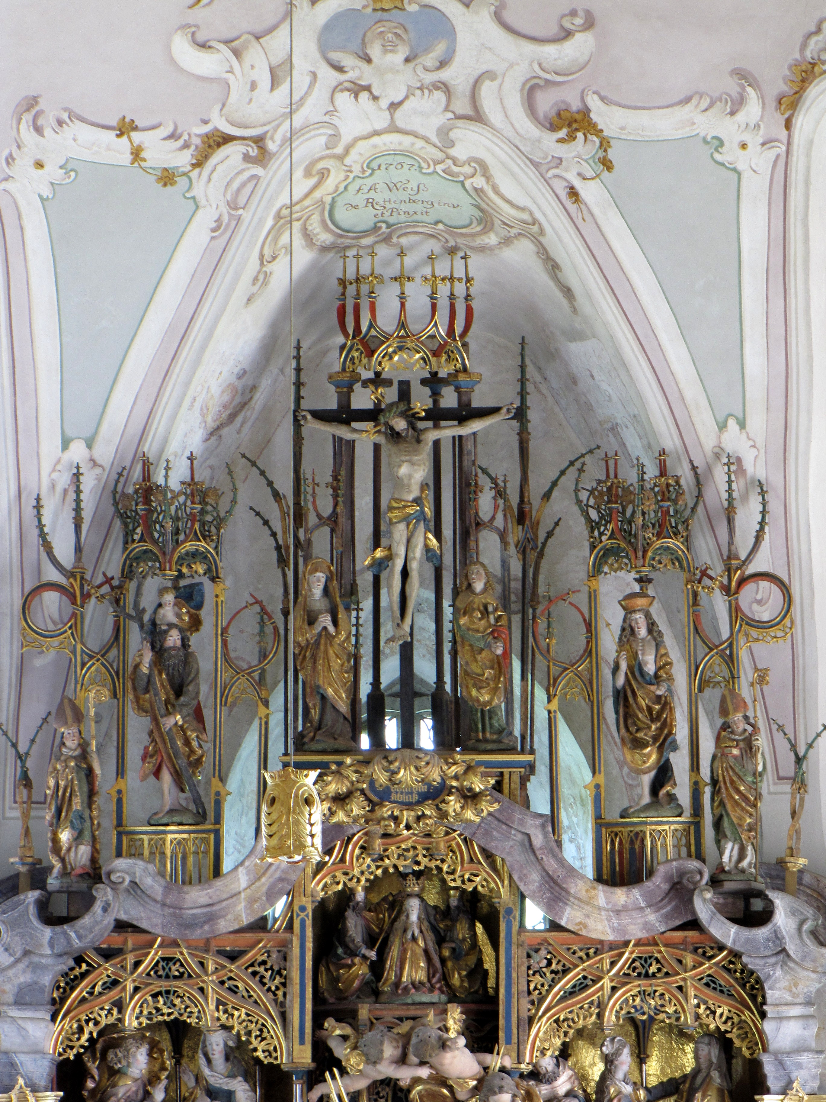 Gesprenge des Hochaltares in der Wallfahrtskirche Maria Rain